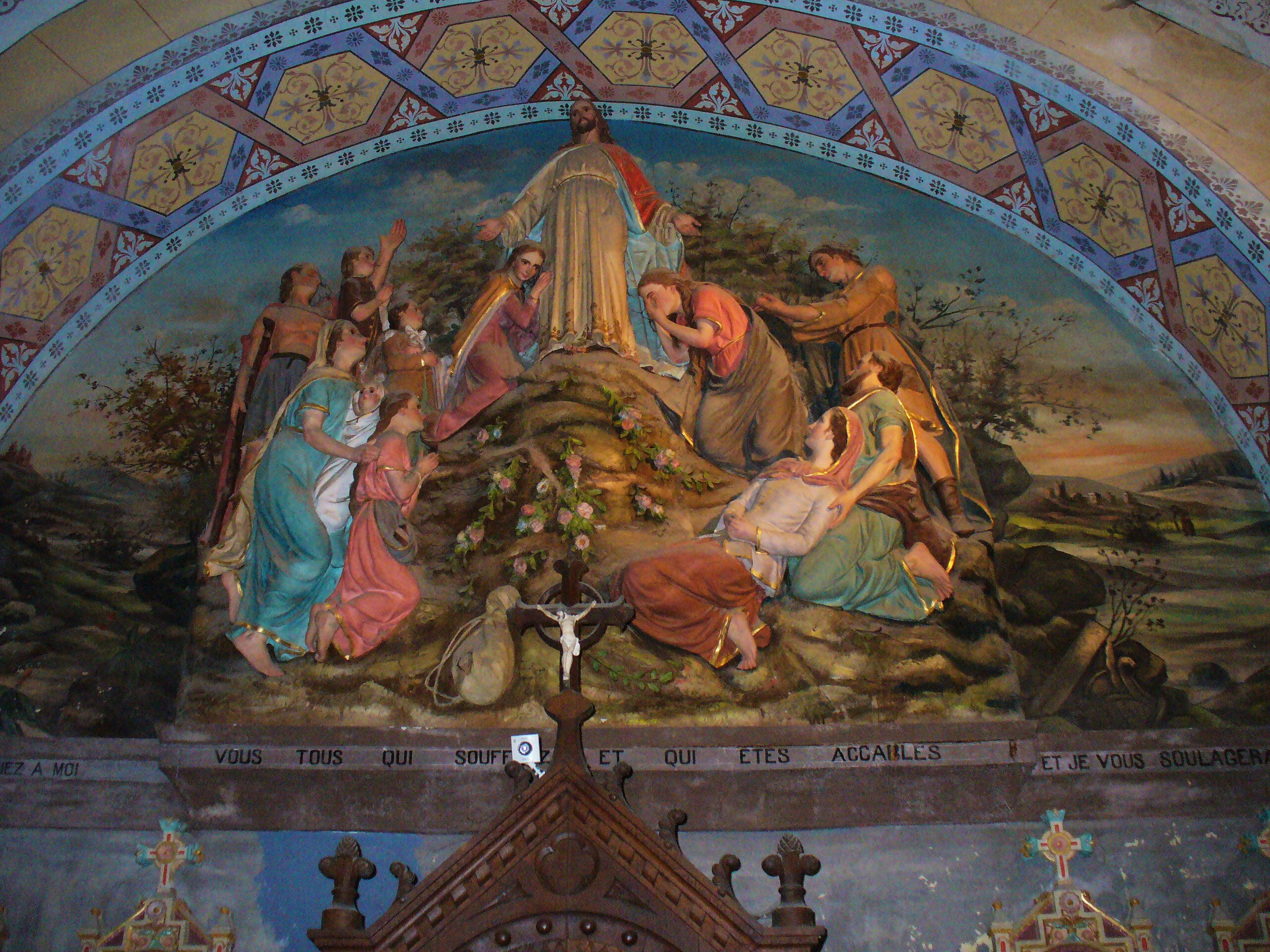 Der Berg der Seligpreisung in der Kirche von Rennes-le-Château